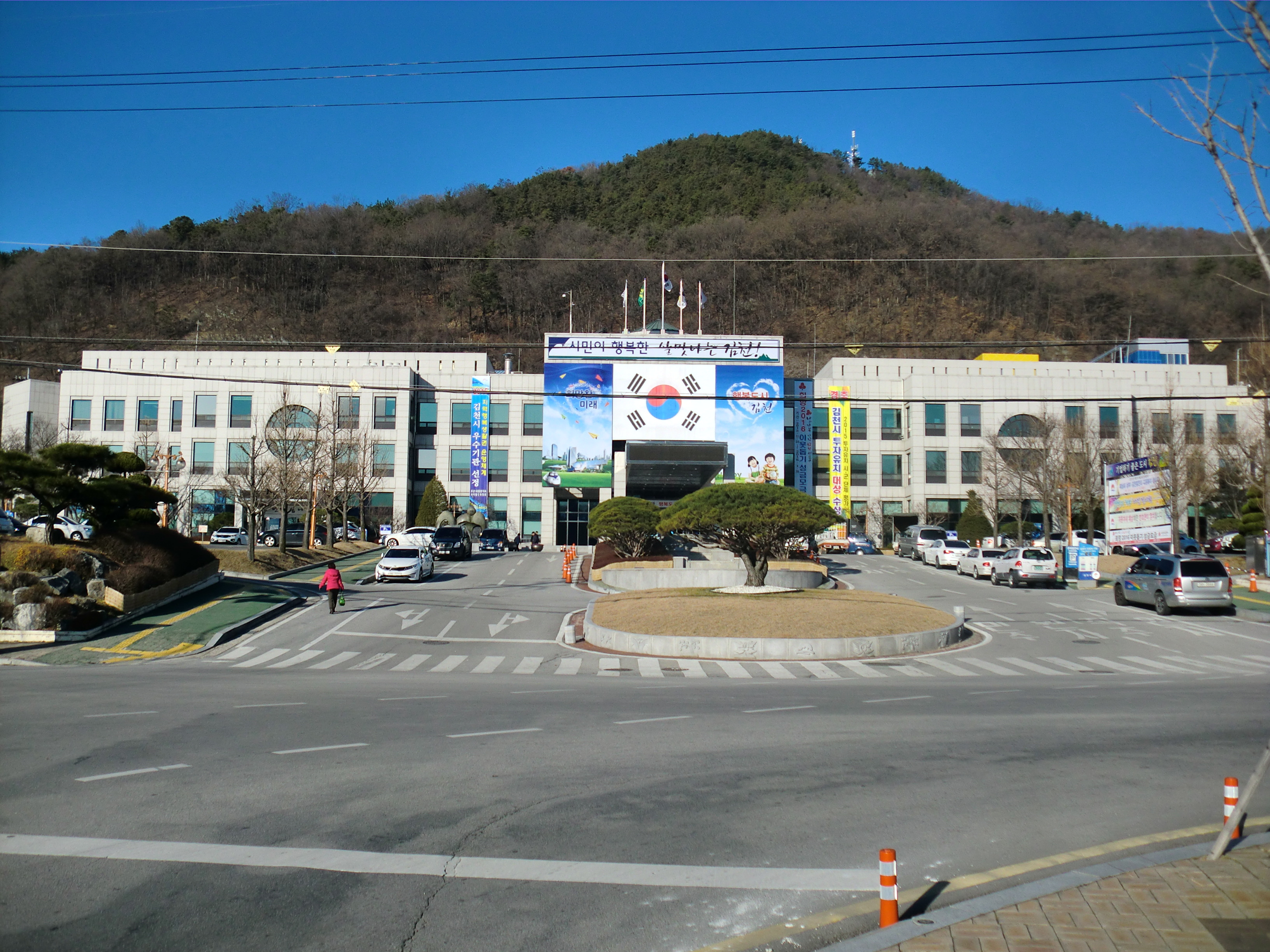 경상북도 김천시에 있는 김천시청